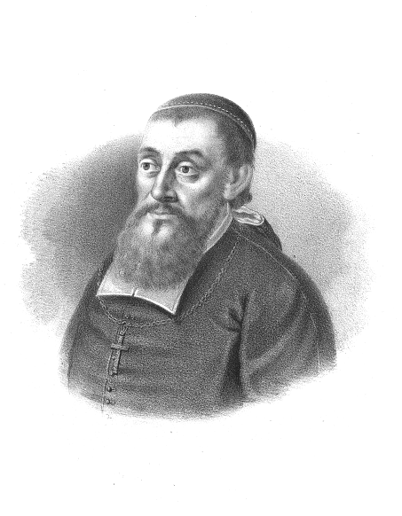 Wojciech Baranowski primate of Poland